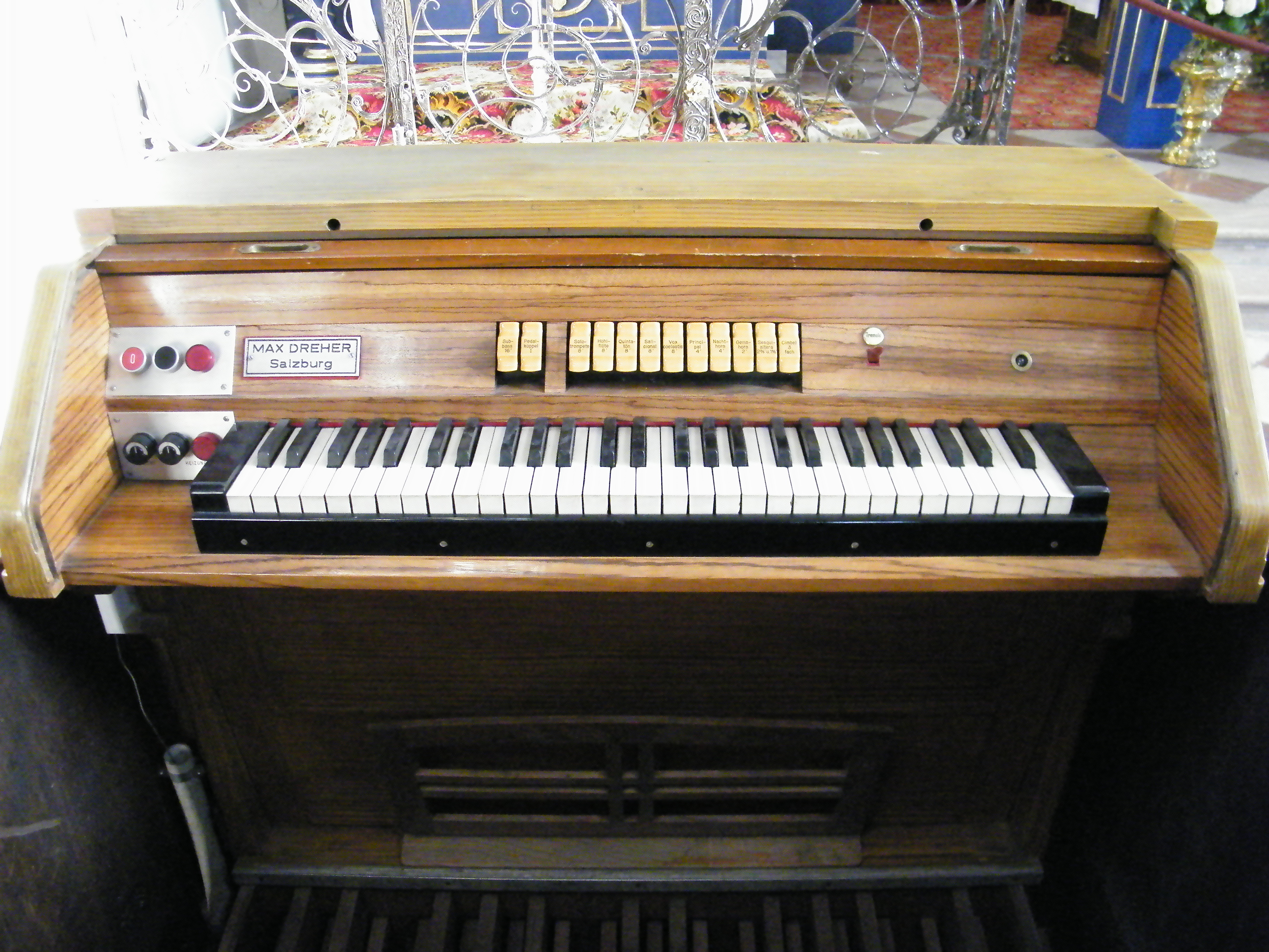 Dreher-&-Flamm-Orgel 1939